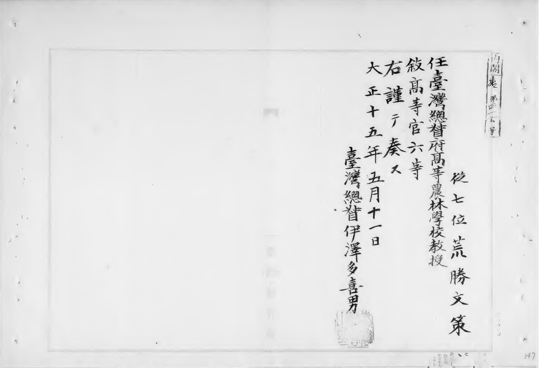 荒勝文策被任免臺灣總督府高等農林學校教授之公文